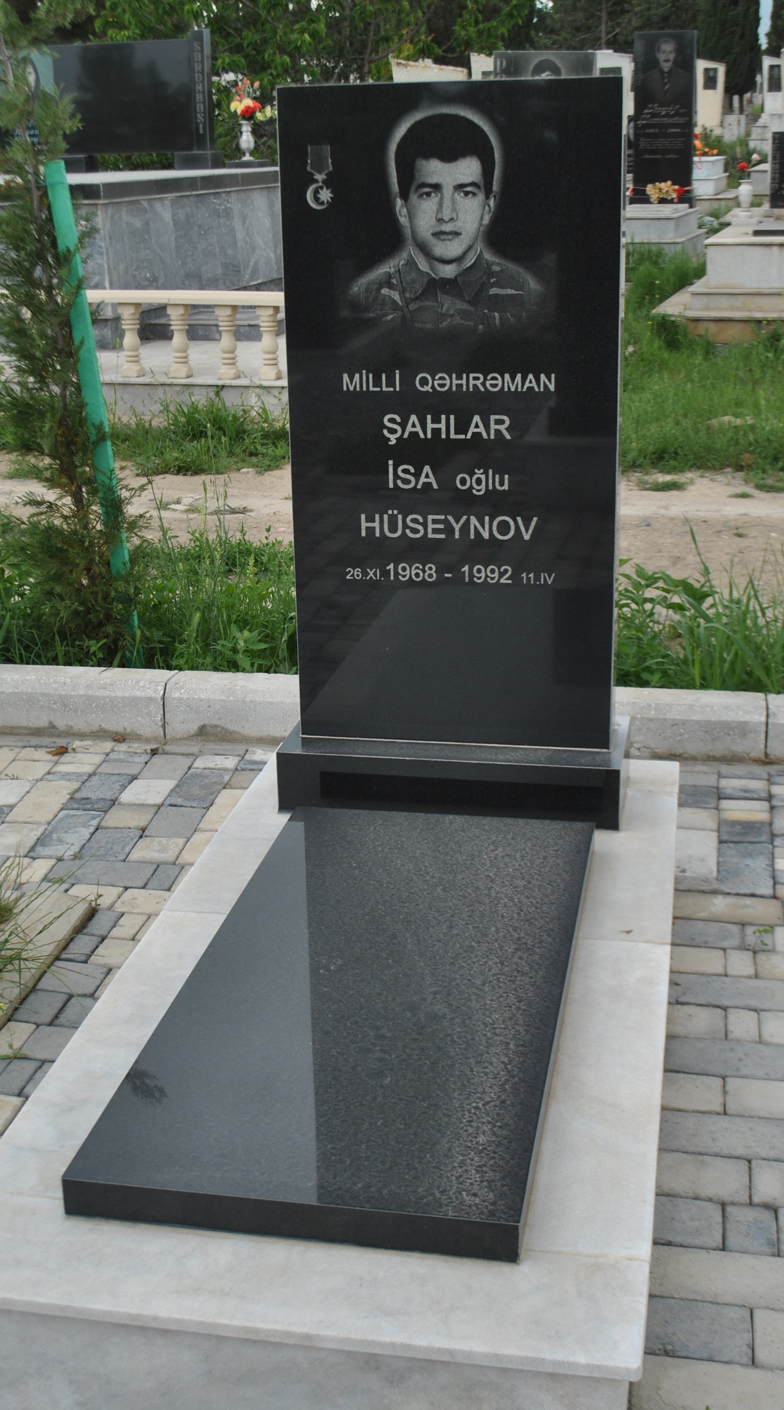 Şəhidin qəbir üstü